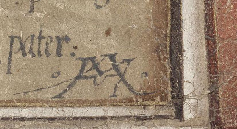 Signet von Hiob Magdeburg - Ausschnitt aus der 1566 geschaffenen Karte von Thüringen und Meißen. Duringische und Meisnische Landtaffel von 1566 digital im Kartenforum der SLUB Dresden